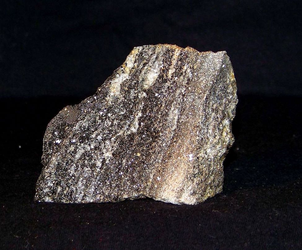 Hornfels z żyłkami kwarcu mlecznego, powstałymi w procesach hudrotermalnych, sztolnia Pirytu,szklarska Poręba, Polska